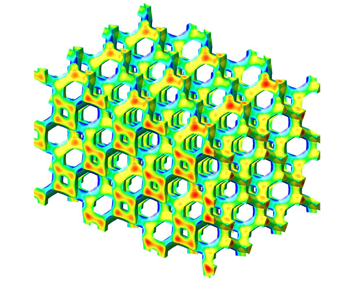 Conductivité thermique dans une mousse métallique